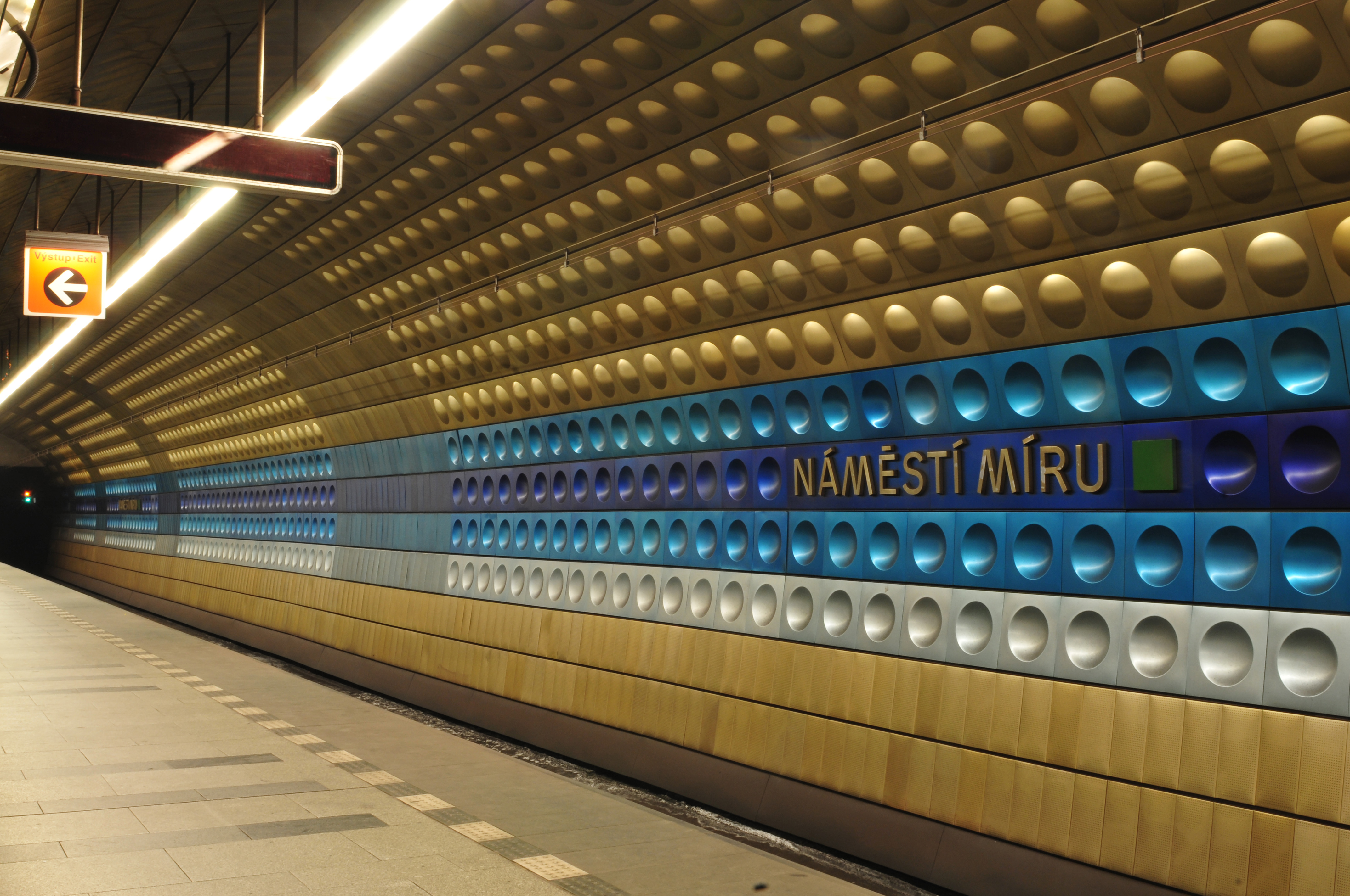 Metro Praha